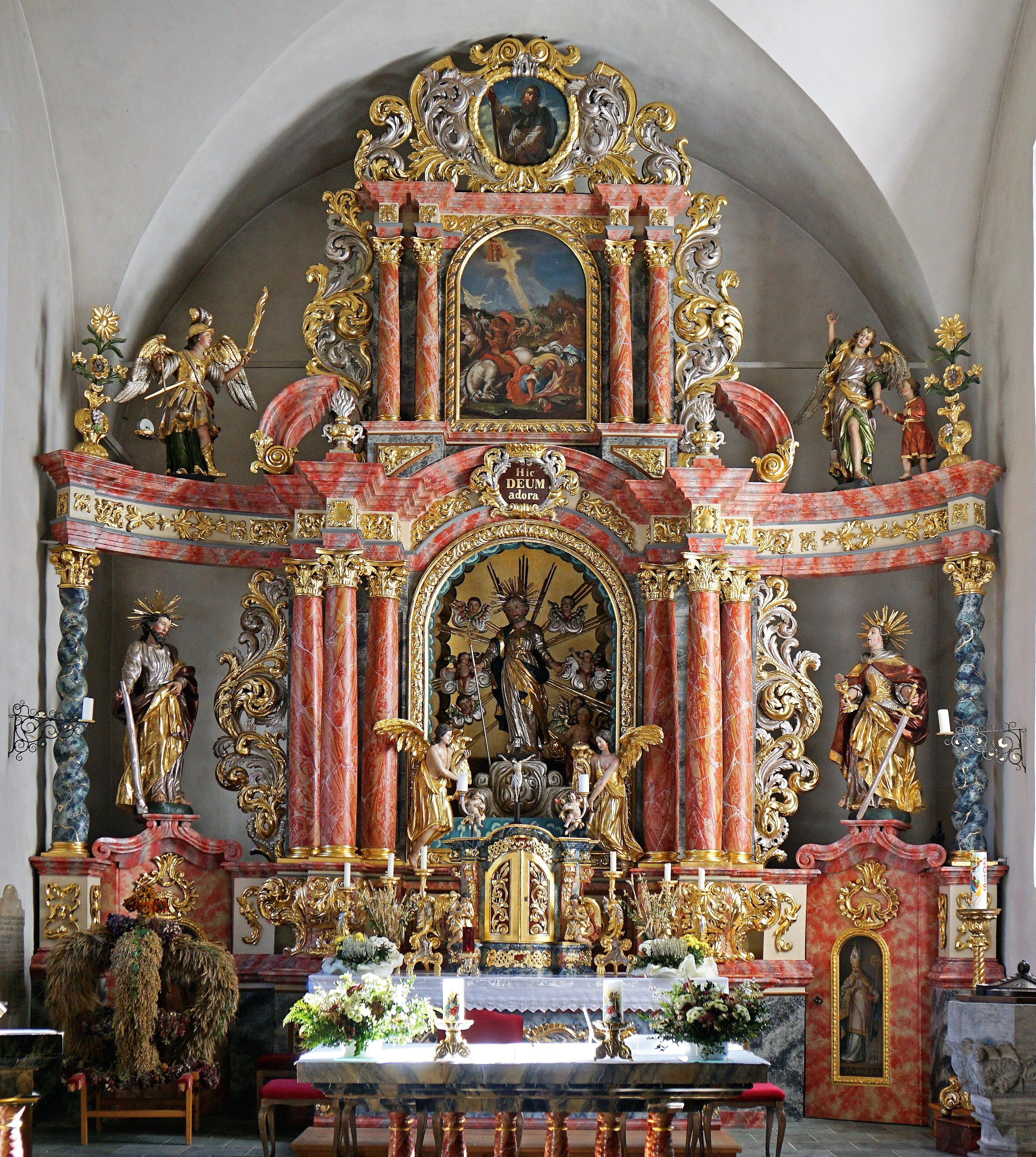 St. Peter im Katschtal (Rennweg), barocker Hochaltar